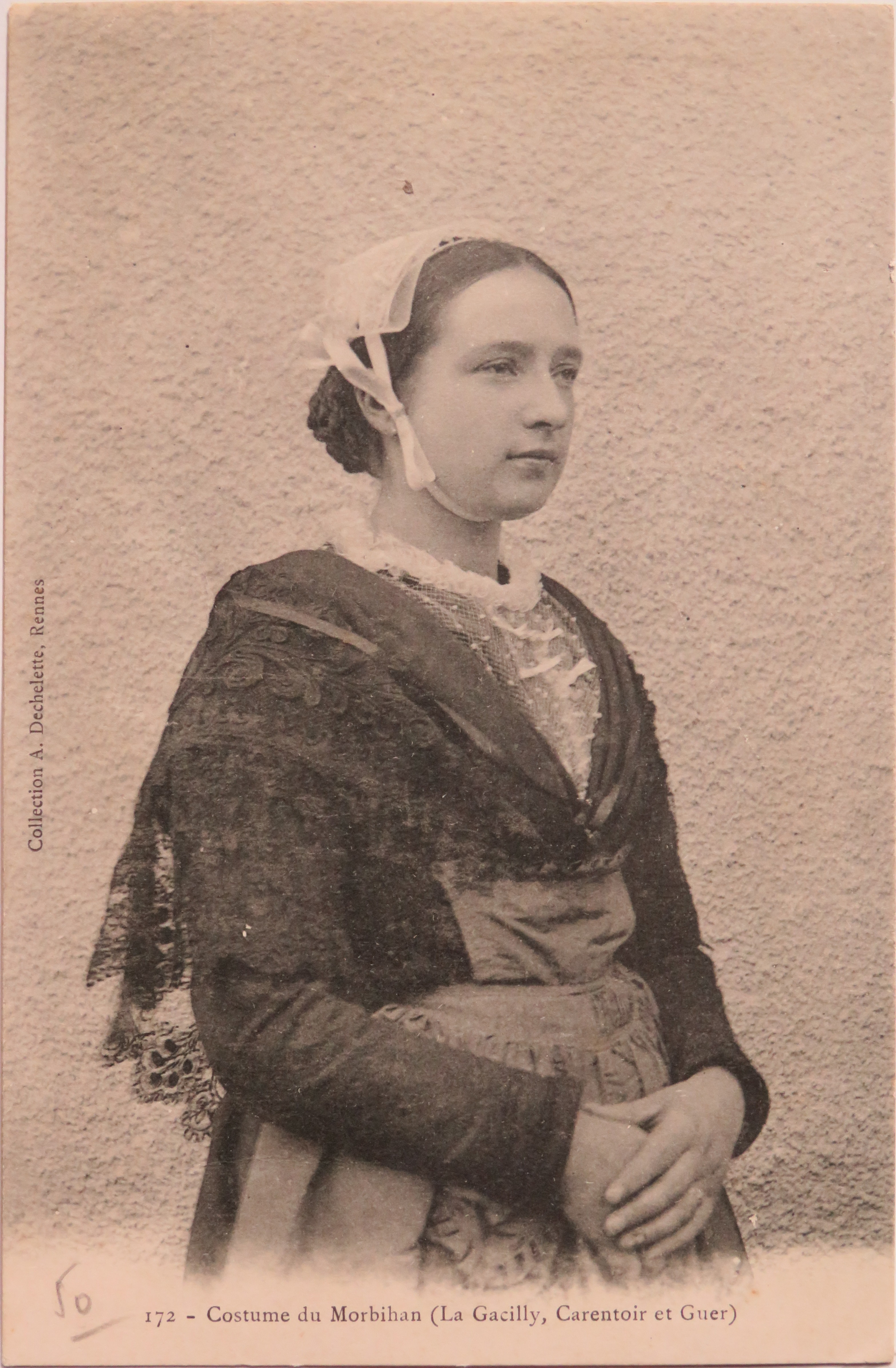 Carte postale Collection A. Dechelette, Rennes représentant une femme bretonne en costume (Opération Libre Peillac/Les Fougerêts).